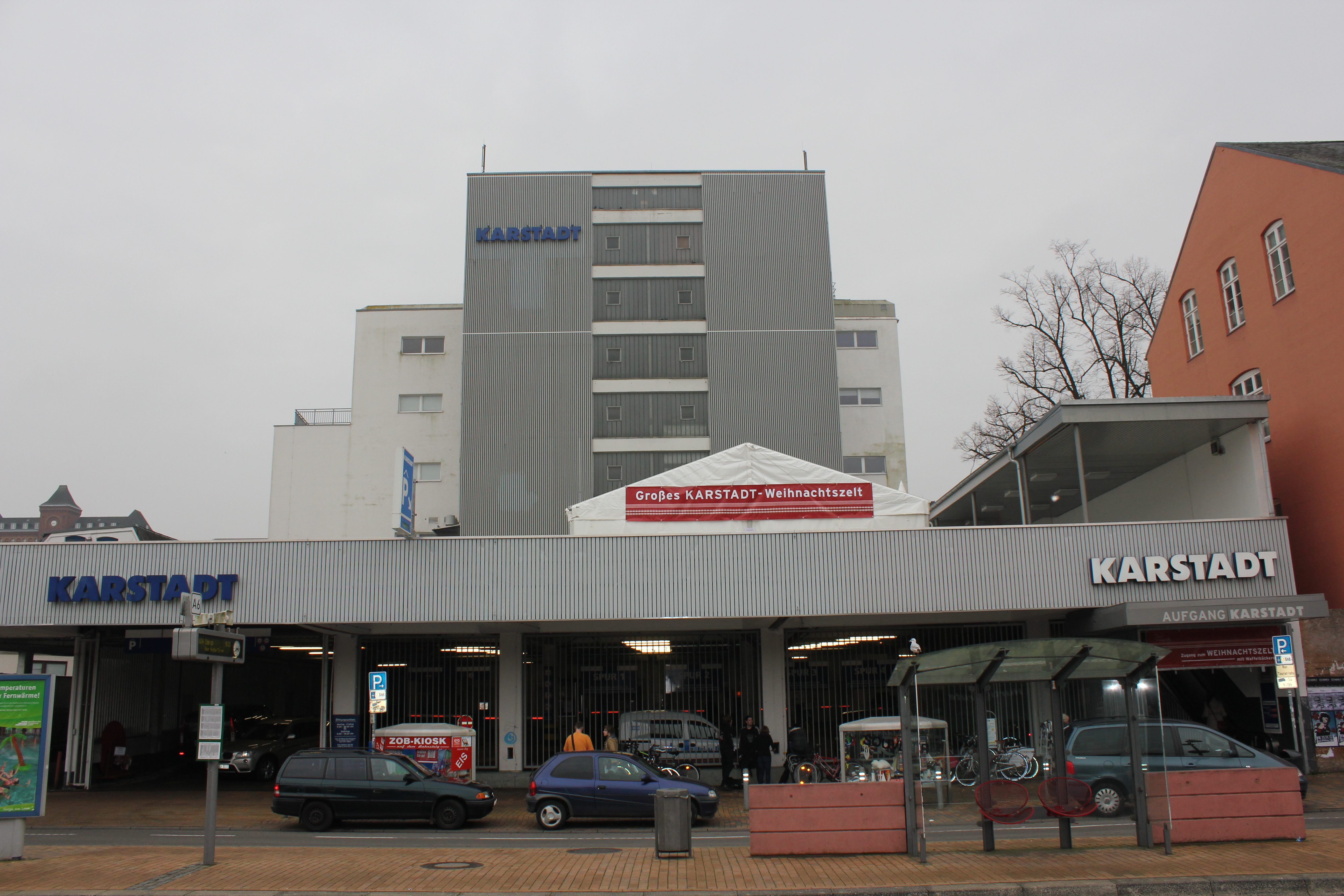 Karstadt (ehemaliges Hertie-Gebäude), Flensburg Beginn der Weihnachtszeit 2011; liegt beim ZOB